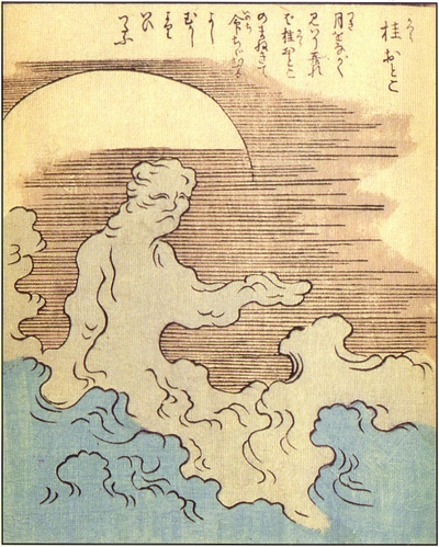 Katsura-otoko (桂男) from the Ehon Hyaku monogatari (絵本百物語)